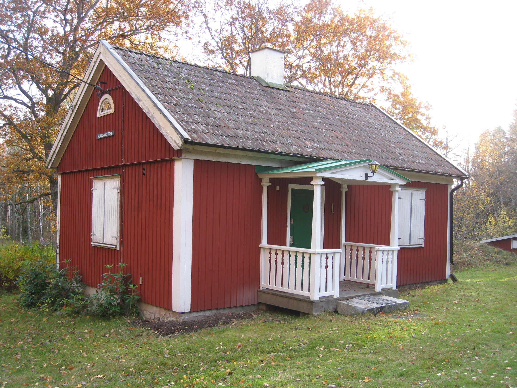 Nuvarande bostadshuset vid Henriksdals torp i Görvälns naturreservat, Järfälla.